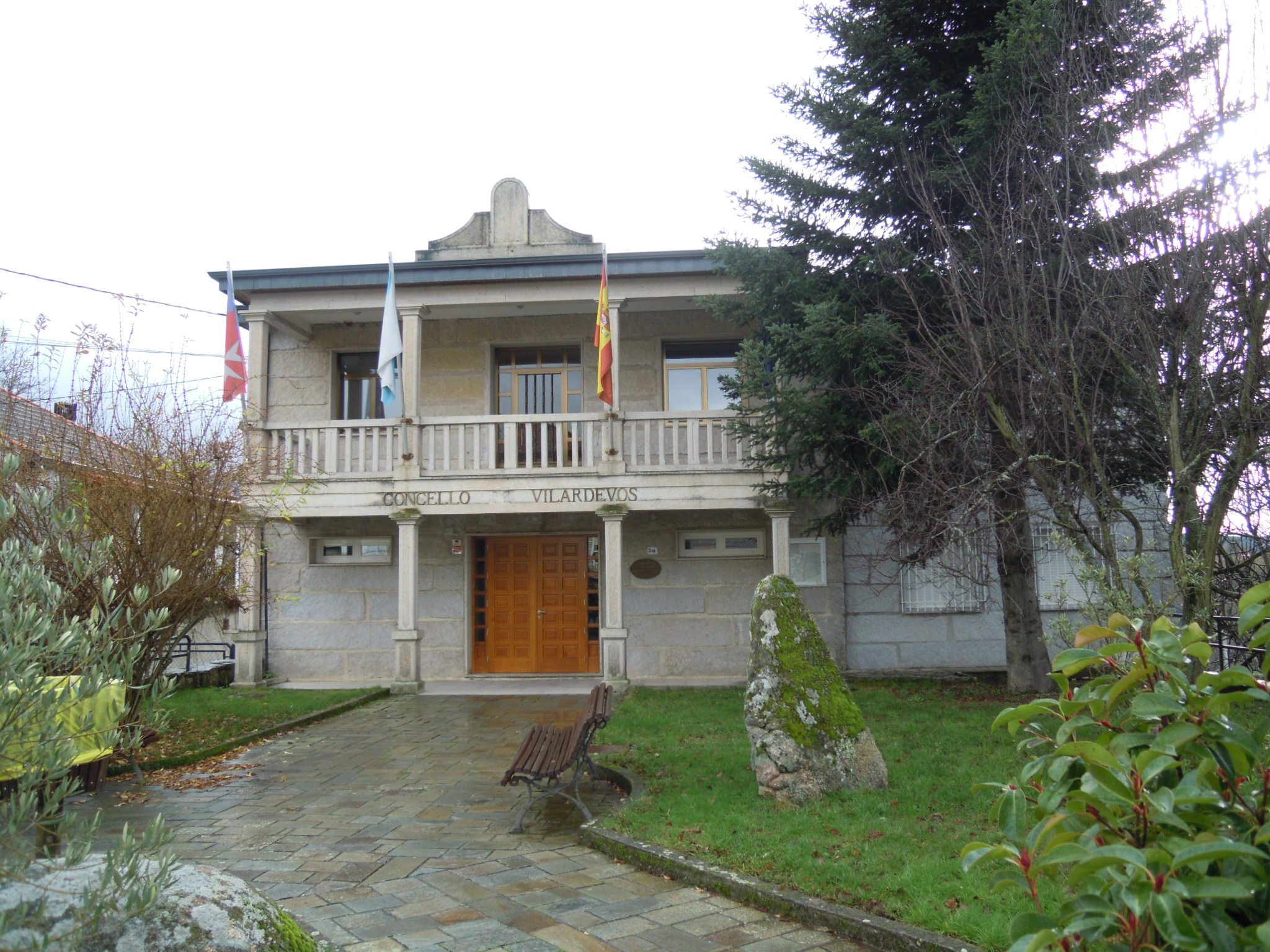 Casa consistorial de Vilardevós